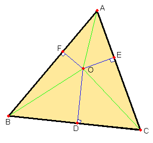 埃尔德什-莫德尔不等式的图示